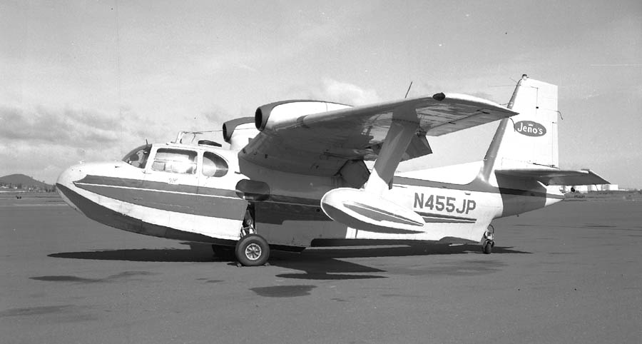 PiaggioatBF